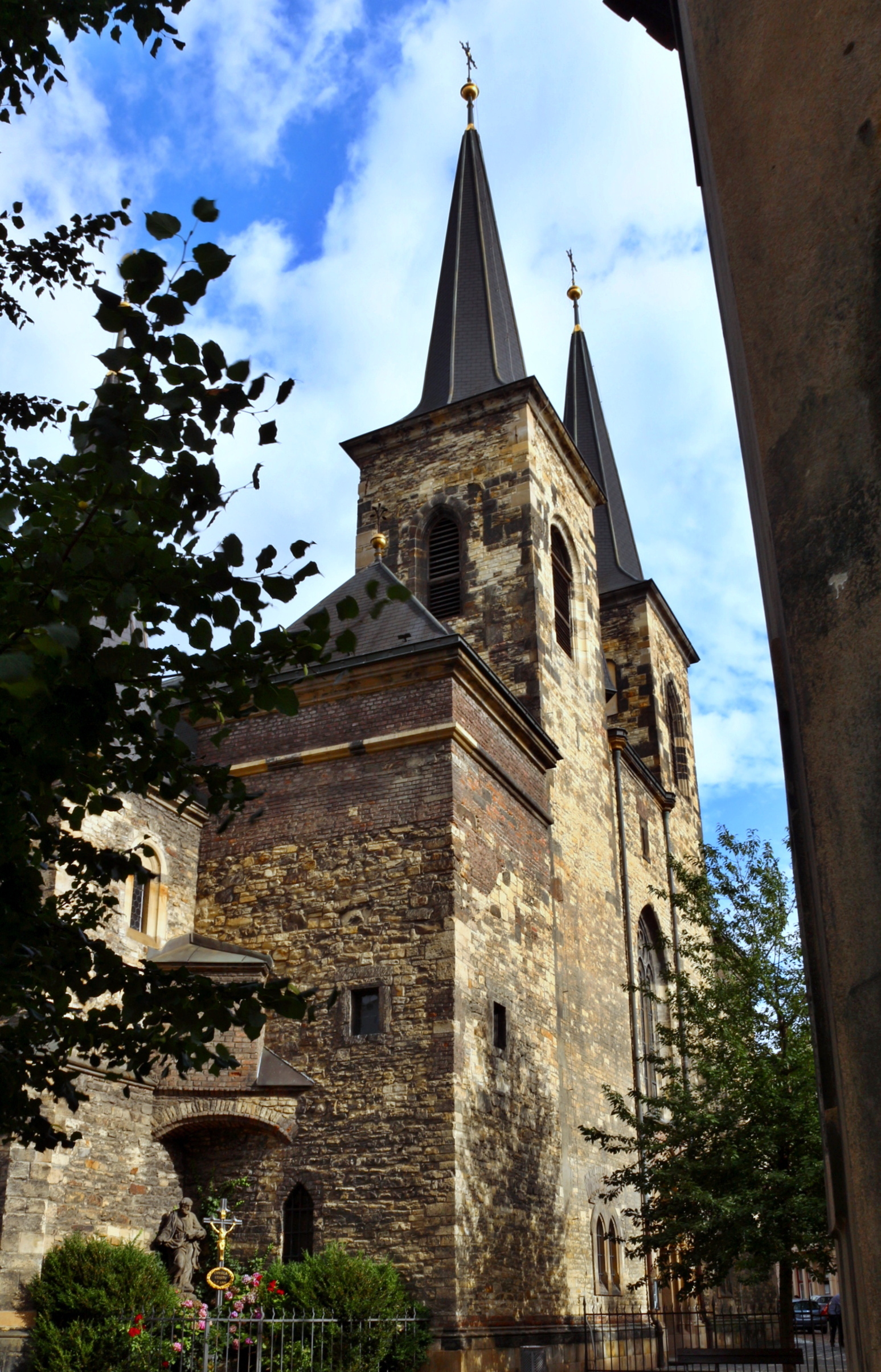 Kostel svatého Petra Na Poříčí